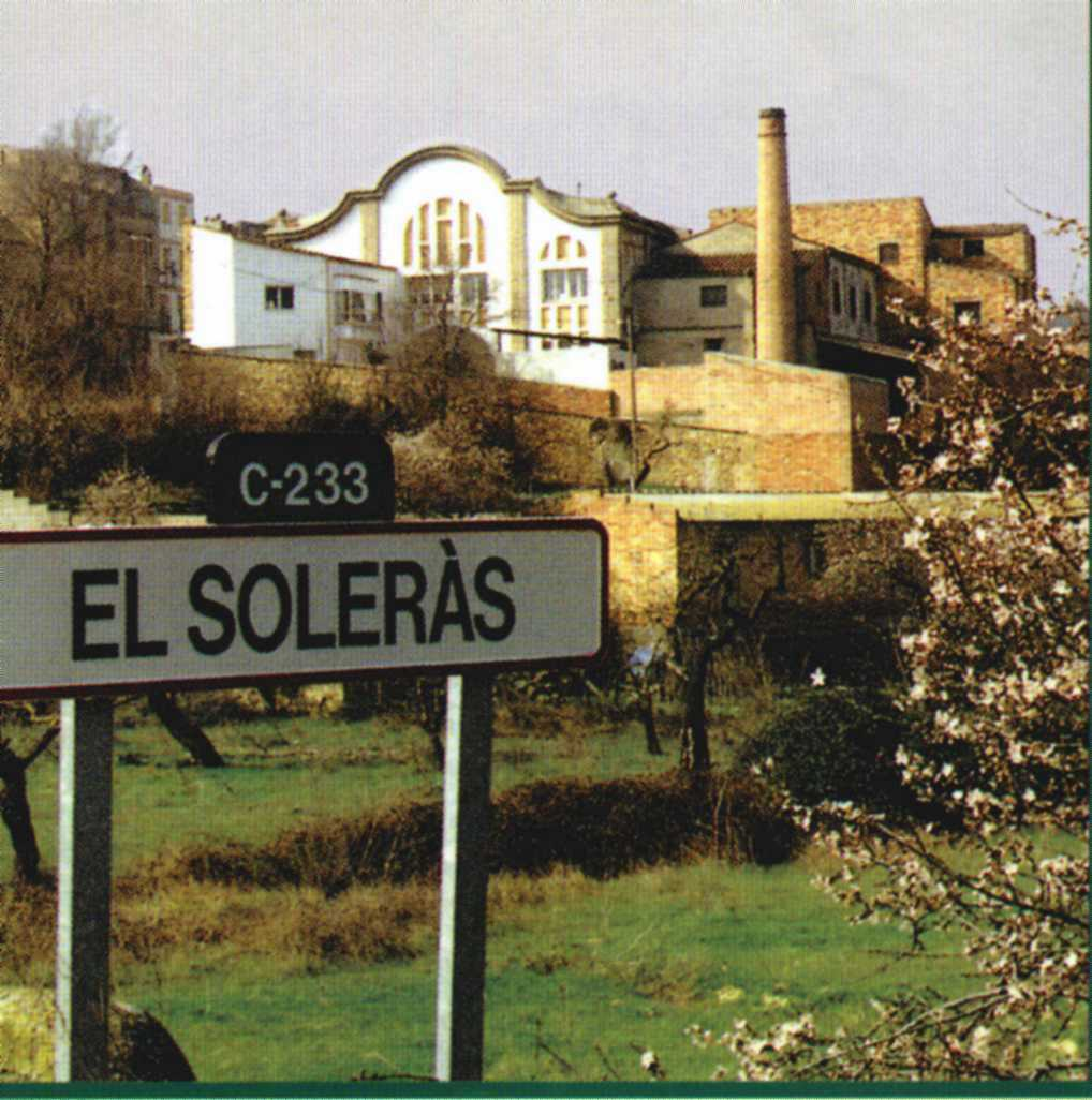 Cooperativa de El soleràs